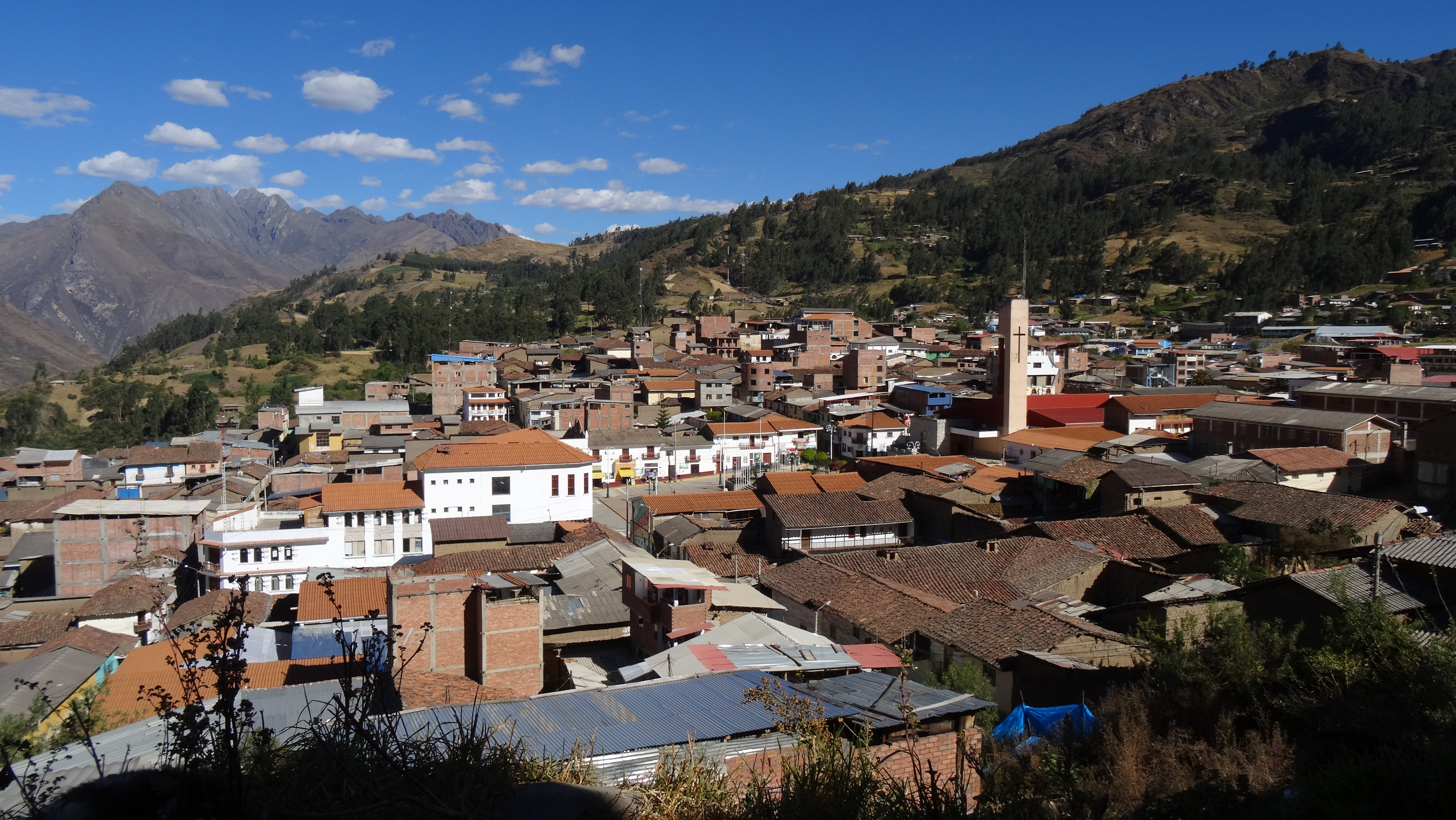 Ciudad de Huari visto desde su perímetro oeste.